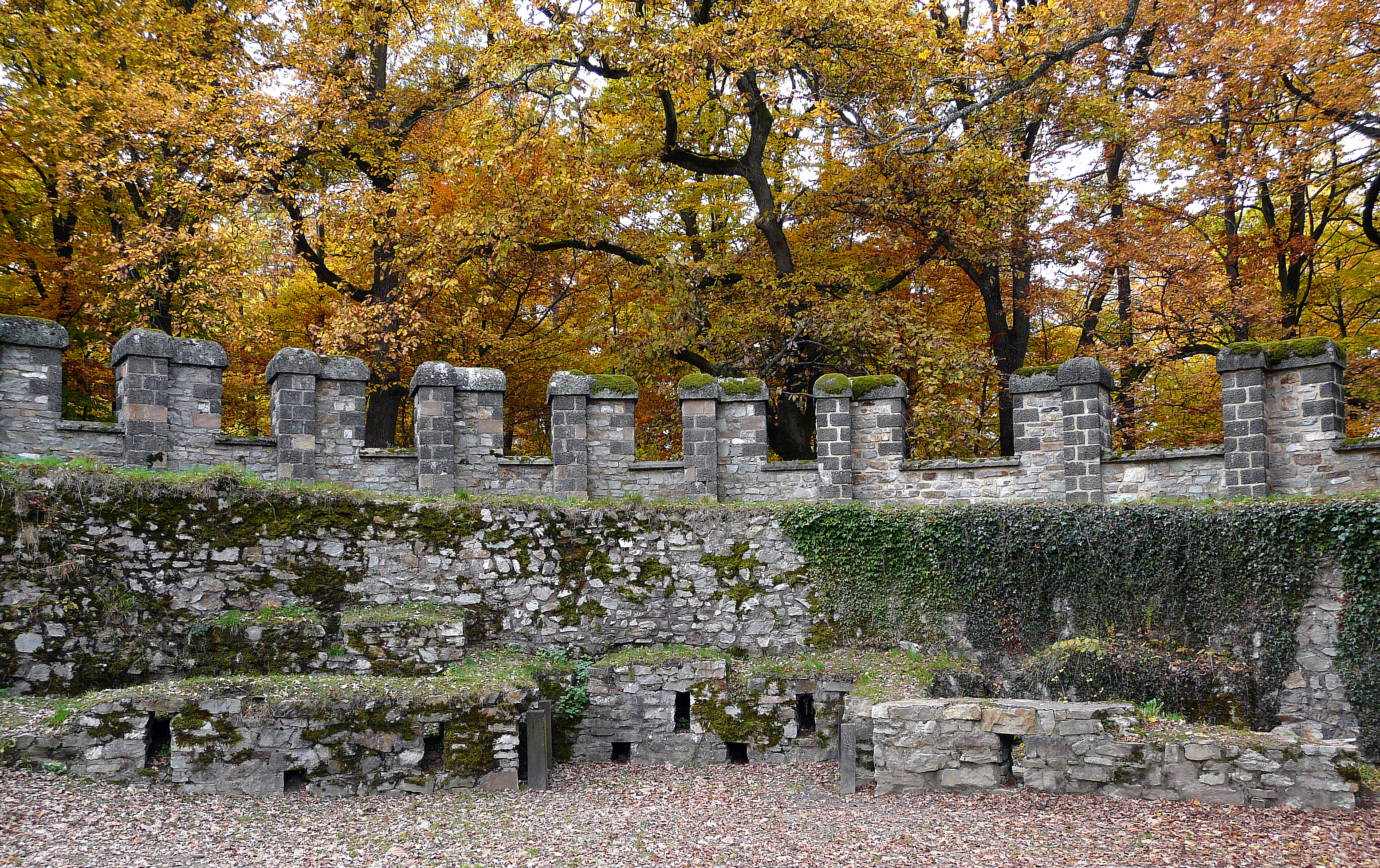 Kastell Saalburg, NO-Ecke, Rekonstruktion des Steinkastells mit vorgelagerten Mauern des Holz-Stein-Kastells